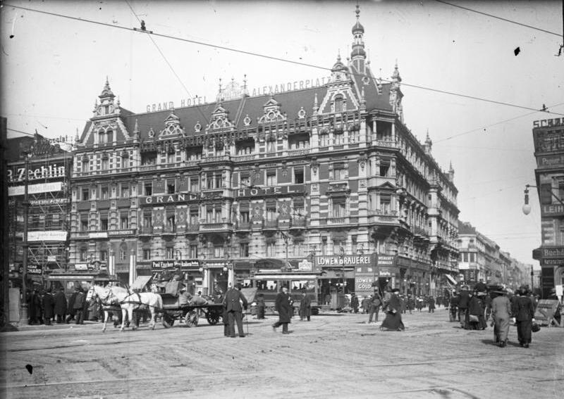 Zentralbild Berlin im Jahre 1910 UBz: den Alexanderplatz mit Blick in die Neue Königsstraße.